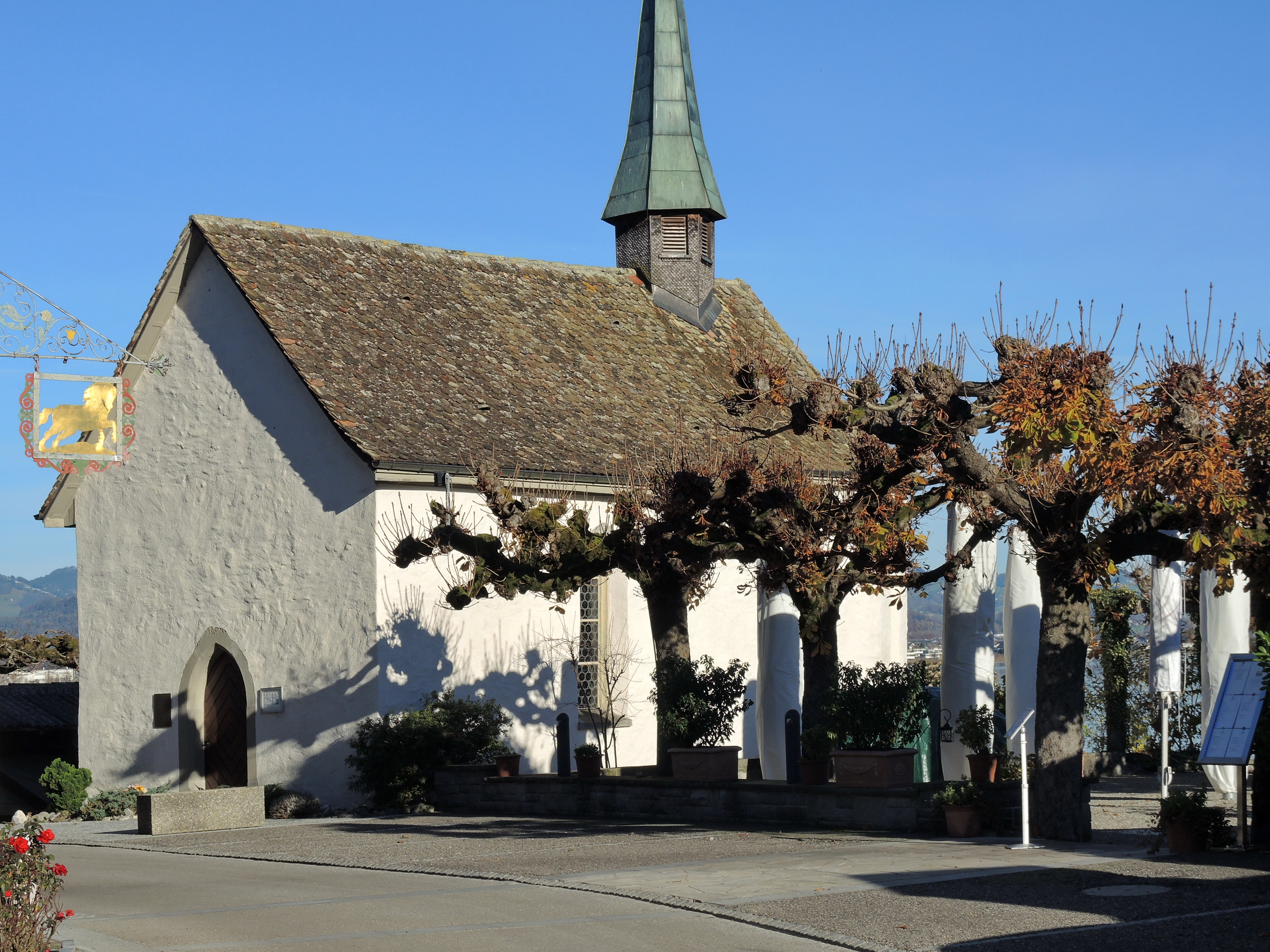 Kapelle zu Ehren der heiligsten Dreieinigkeit (Holy Trinity chapel) in Hurden (Switzerland), adjoint to the Holzbrücke on Obersee (upper Lake Zürich) shore